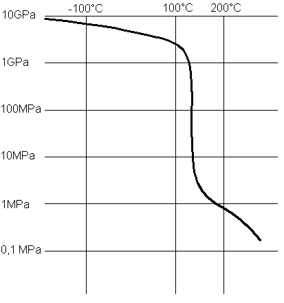 elasticiteitsmodulus_ifv_temperatuur, dit voor PMMA zelf, autoCAD + paint MADe 20 jun 2005 16:02 (CEST)